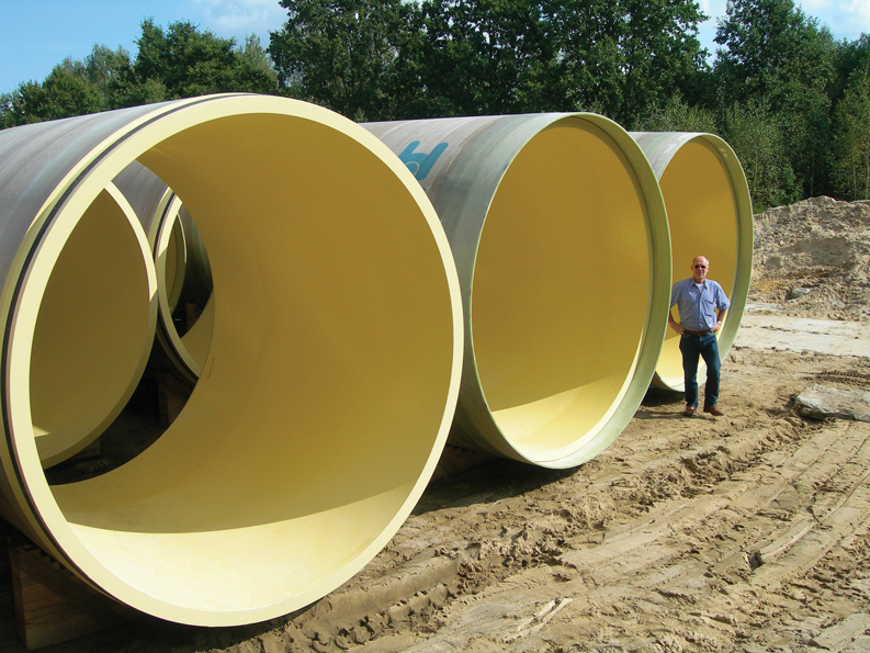 HOBAS 3 Meter Rohre